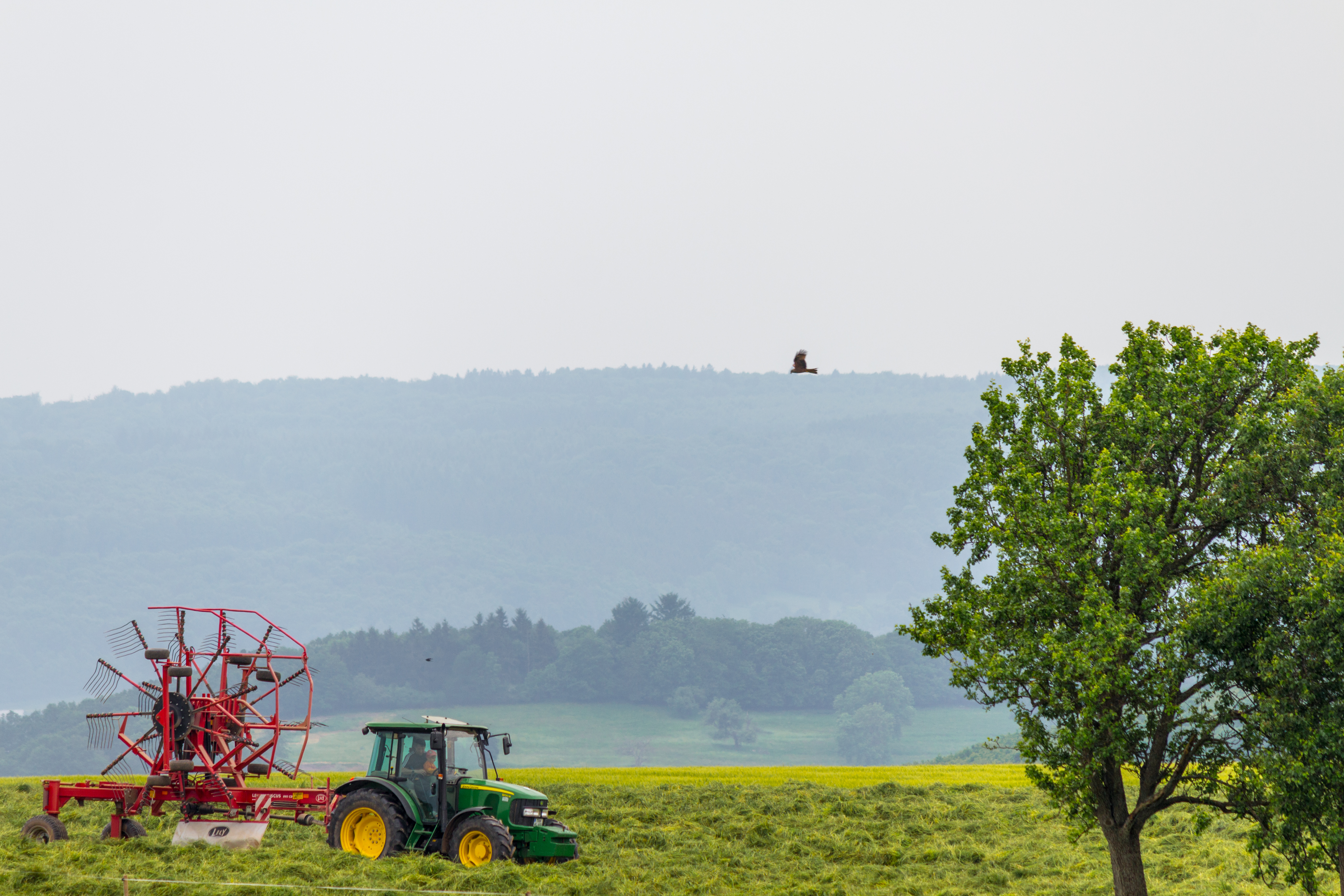 Naturpark Saar-Hunsrück bei Irsch - Traktor Baum Greifvogel